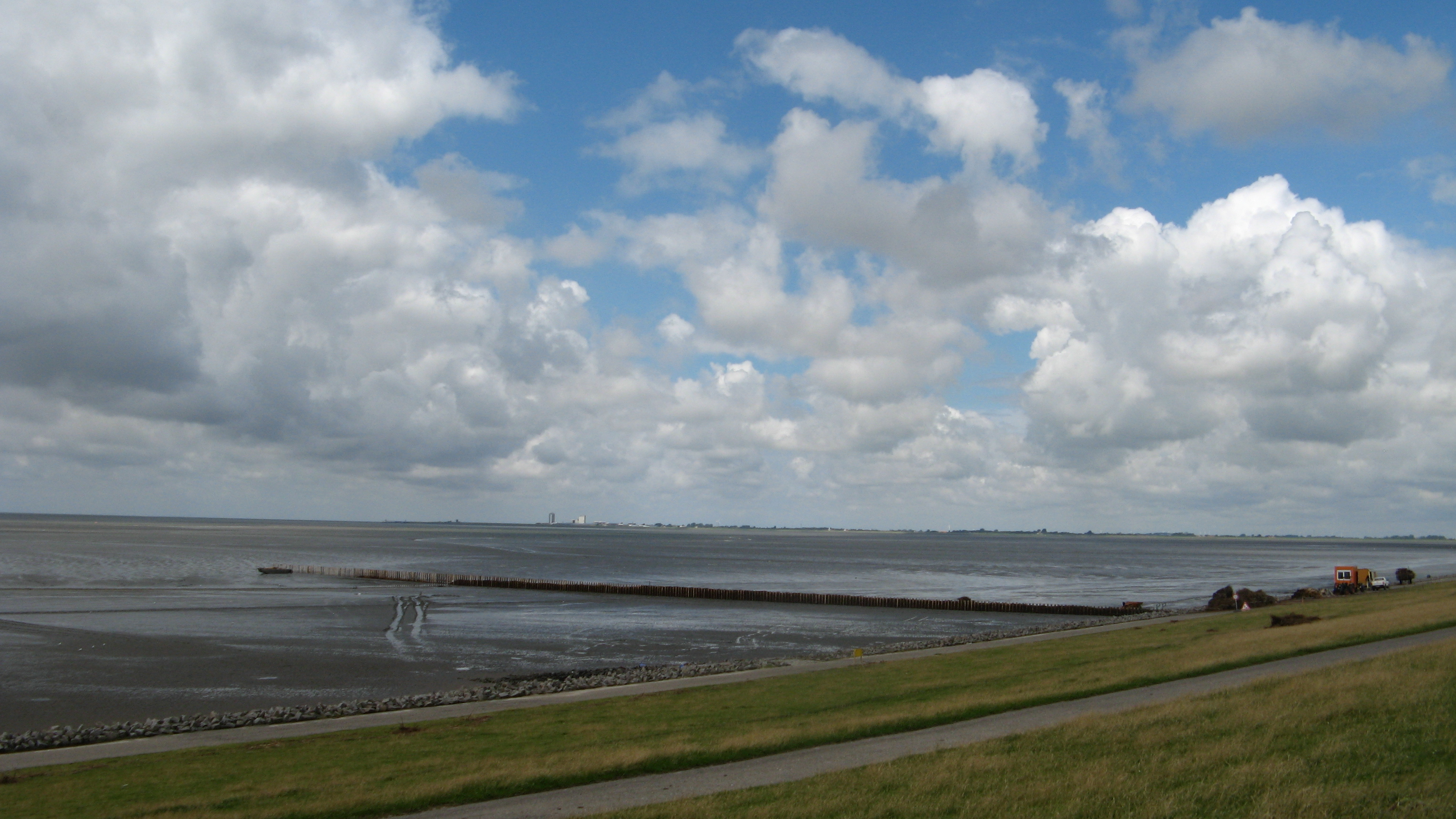 Northern (sic!) part of the Dithmarschen bight, seen from the Speicherkoog harbour to Büsum / Nördlicher (sic!) Teil der Meldorfer Bucht vom Speicherkoog (nahe Hafen) Richtung Büsum.